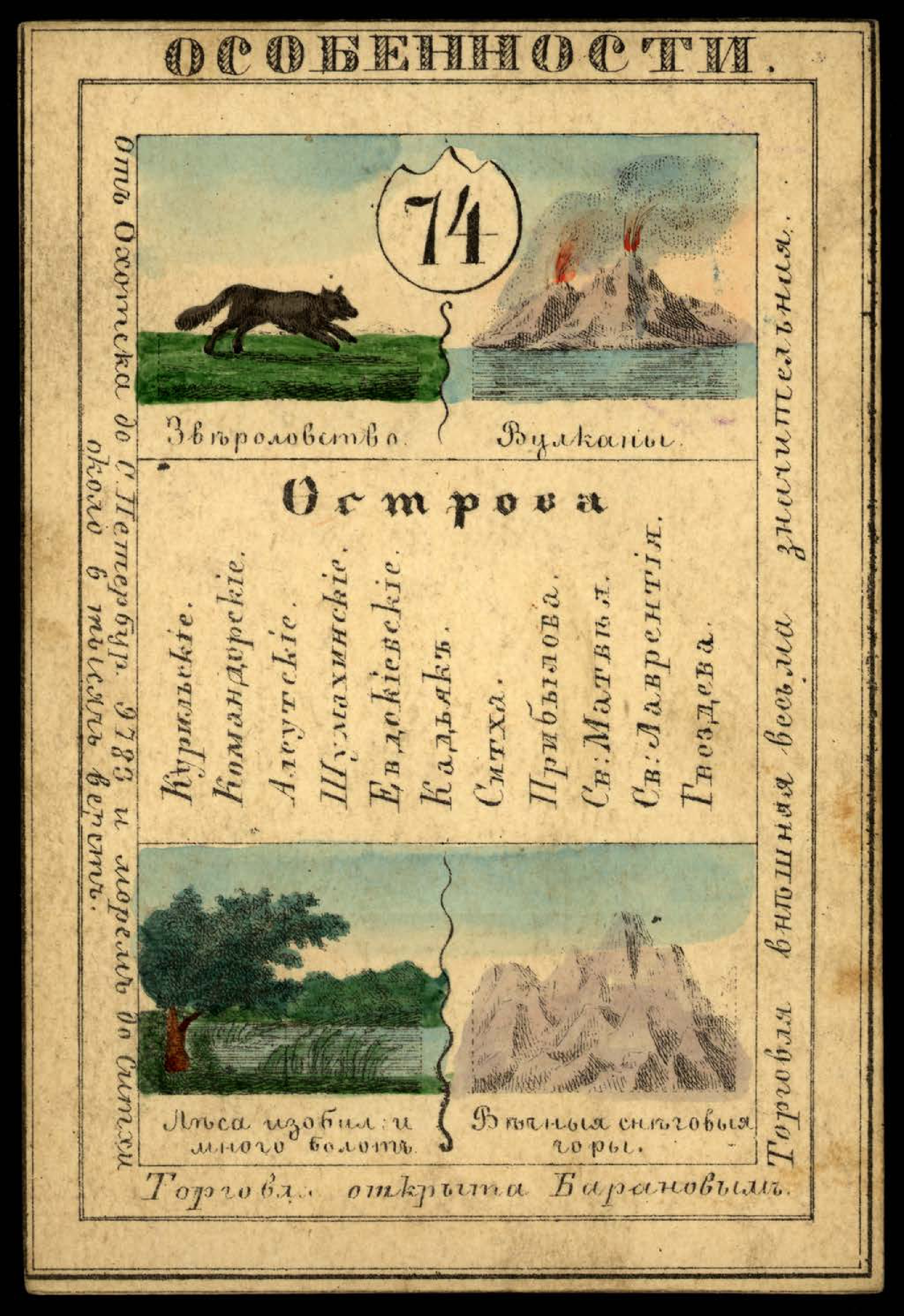 Карточка из набора географических карточек Российской Империи